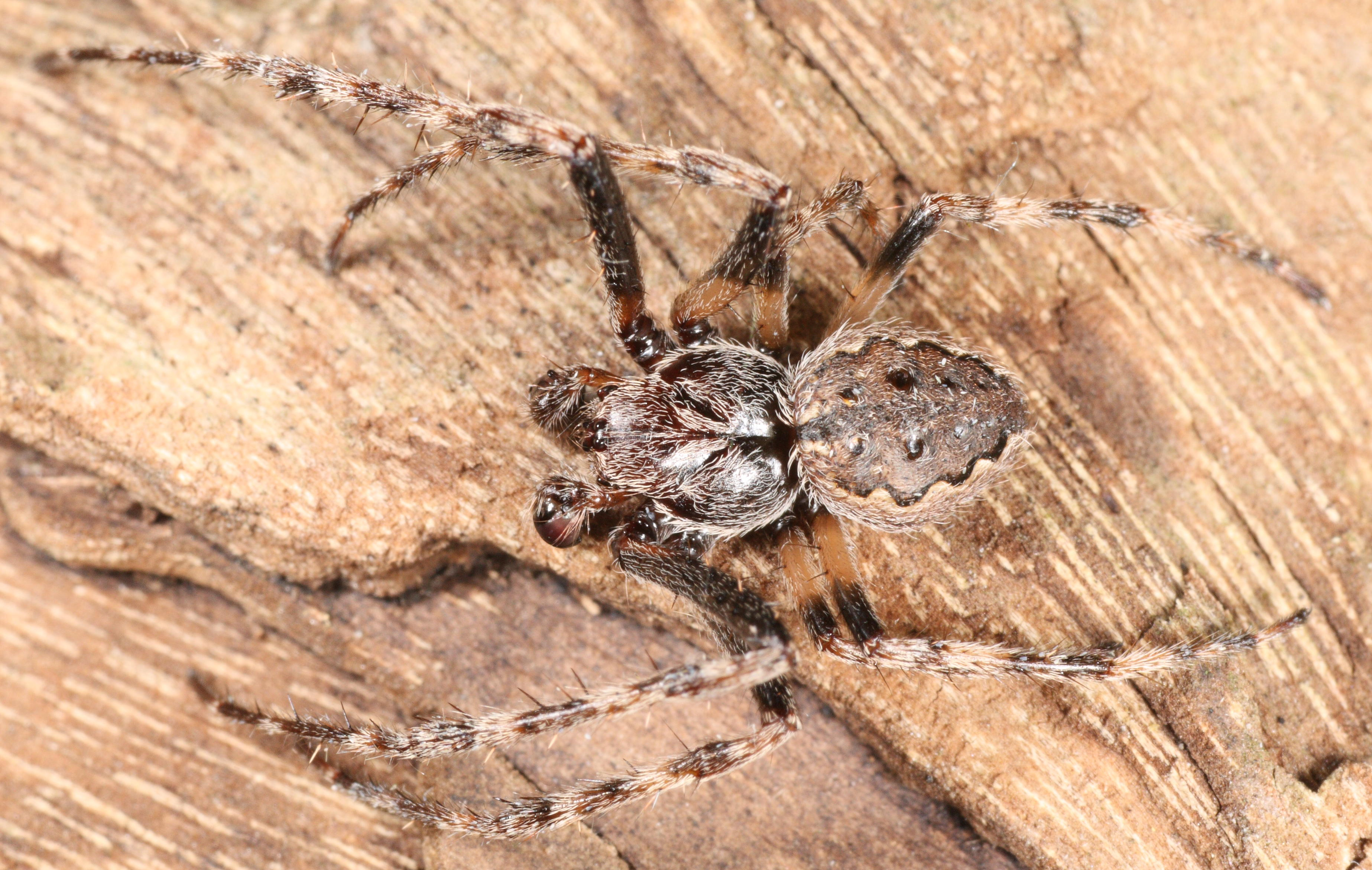 Nattvever Nuctenea umbratica hann overside